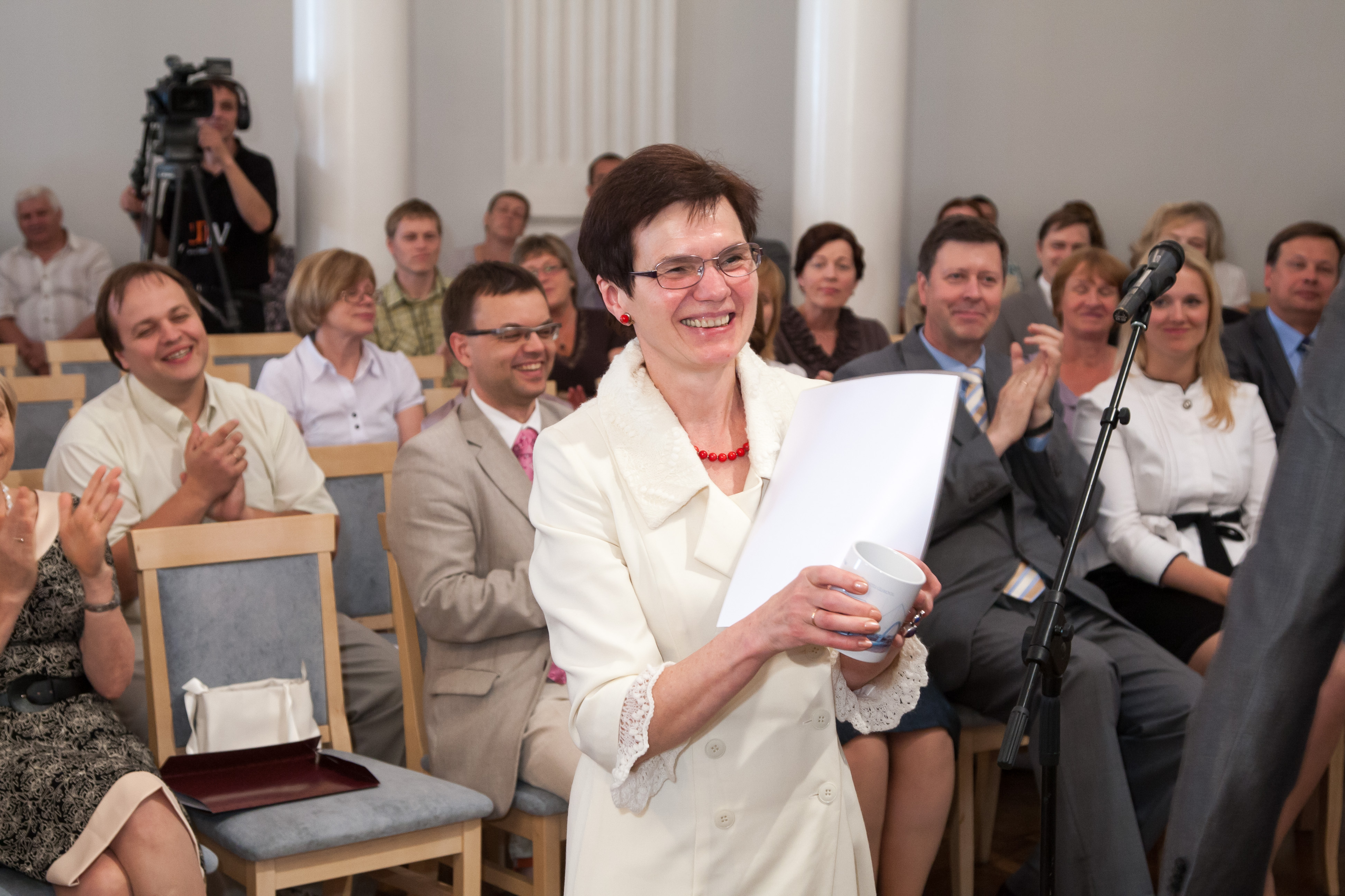 Tartu Ülikooli majandusteaduskonna valdkondlik magistriõppe lõpuaktus TÜ aulas 20. juunil 2012. Pildil TÜ majandusteaduskonna dekaan professor Maaja Vadi.